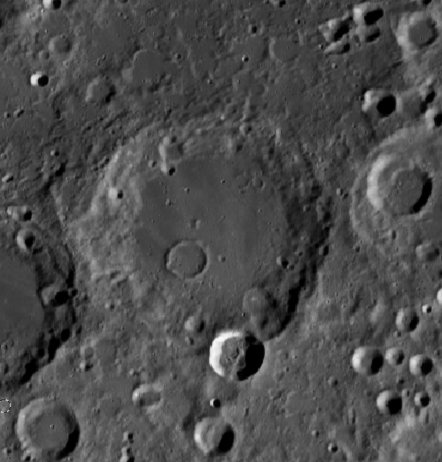 Cráter lunar Stefan. (Imagen LRO)